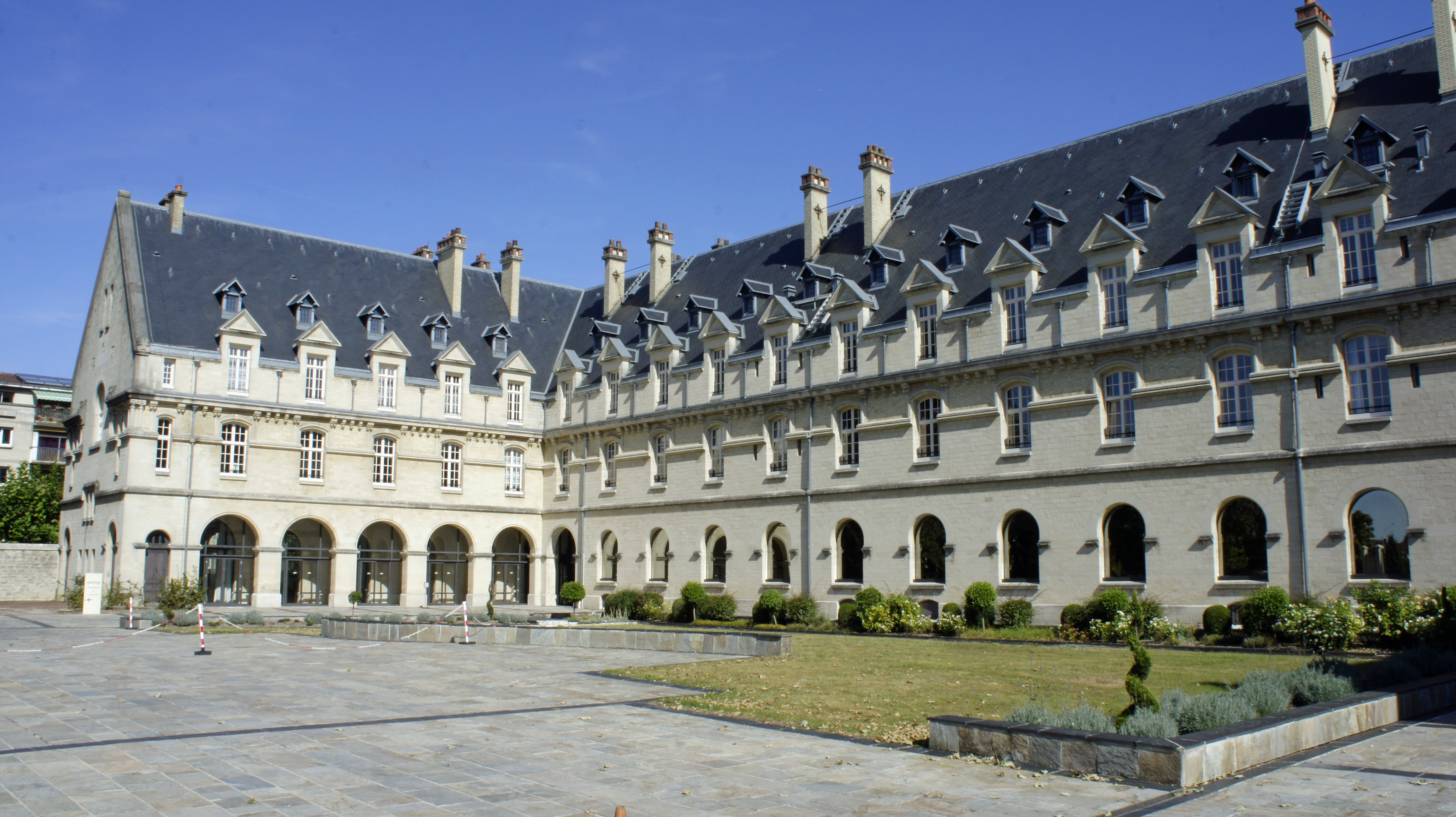 Vue sur la Cour_ouest de l'Hôtel de région de la Champagne-Ardenne.